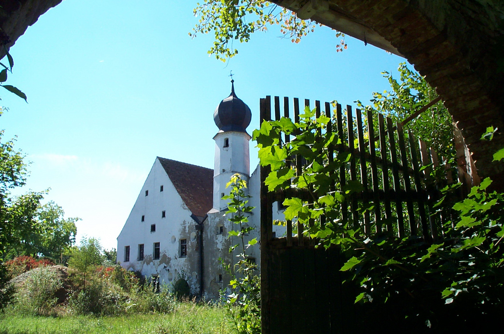 Laberweinting, Grafentraubach. Ursprüngliches Wasserschloss aus dem 16. Jahrhundert.